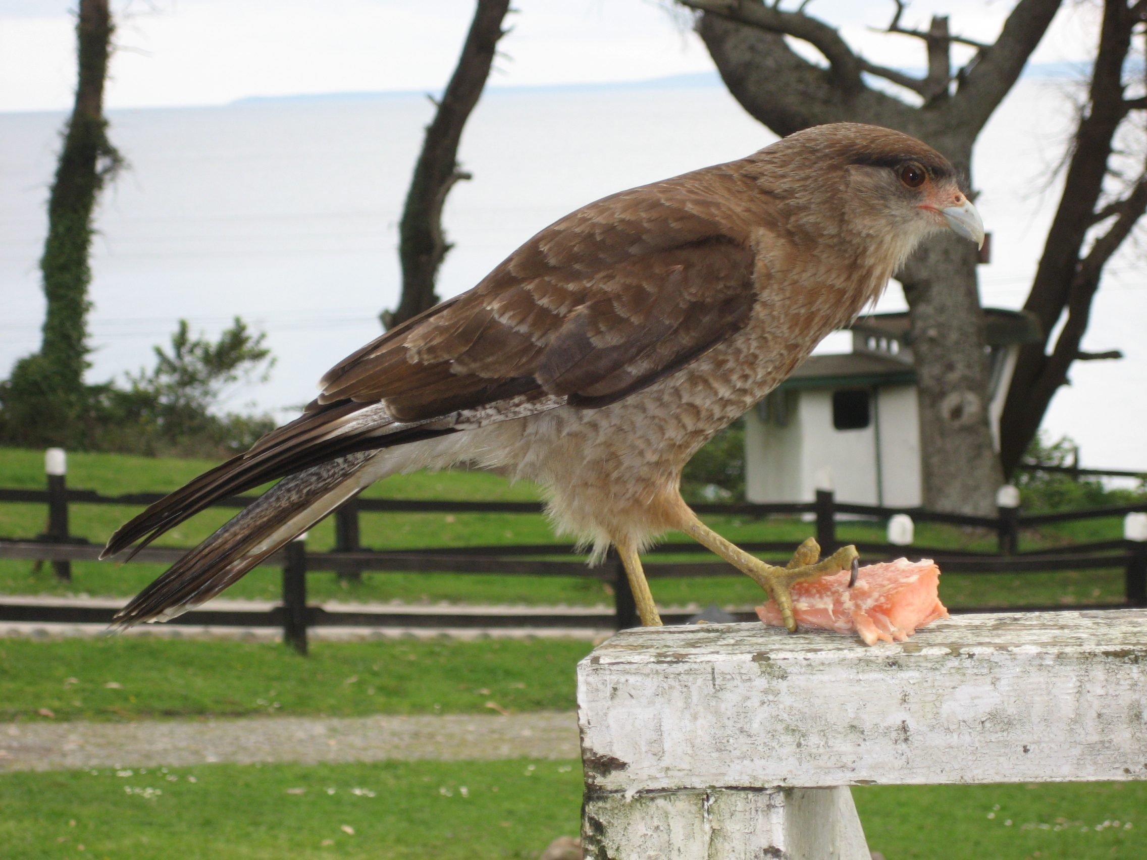 niuhullep, nomlas odneimoc